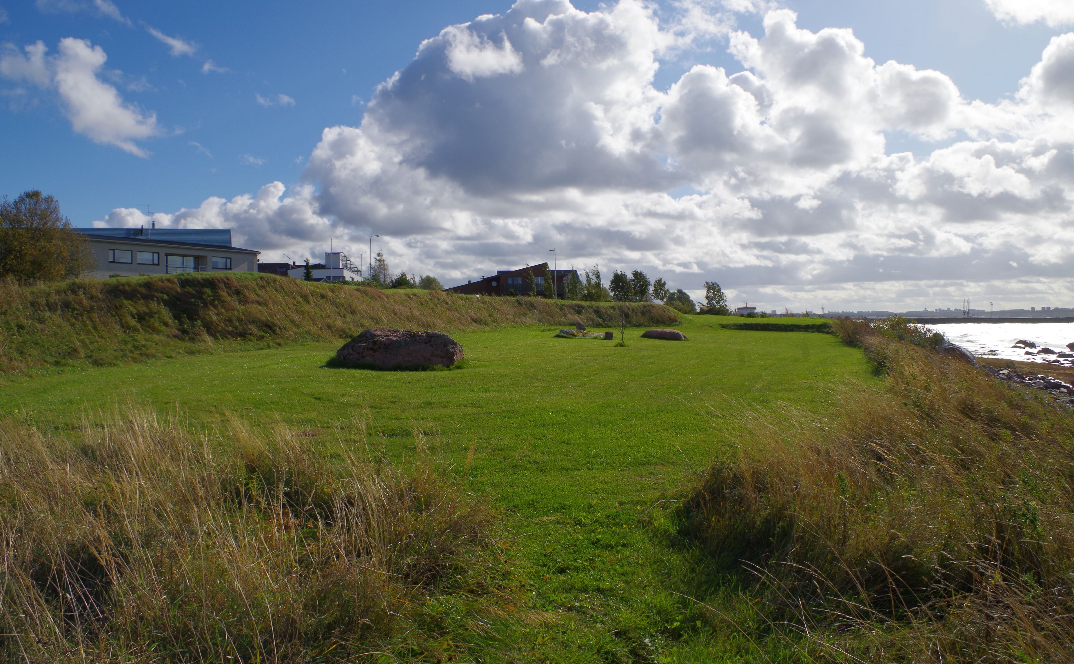 Miiduranna tähtkantsi varemed, 1727. a.